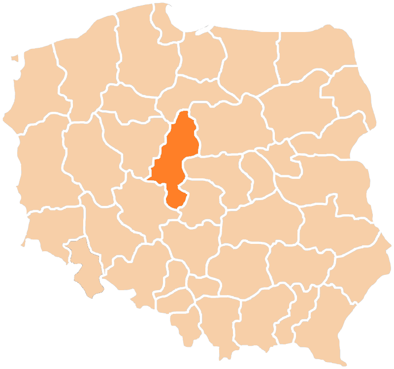 Położenie diecezji włocławskiej na tle podziału administracyjnego Kościoła katolickiego w Polsce (2015 r.).